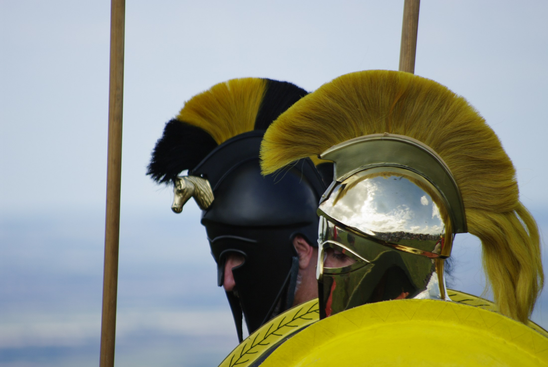 Deux casques grecs du type classique gréco-corinthien portés par deux membres d'une association de reconstitution. Photographie réalisée lors de la 10ème édition des Arverniales le 24 juillet 2011 sur le plateau de Gergovie, Puy-de-Dôme.